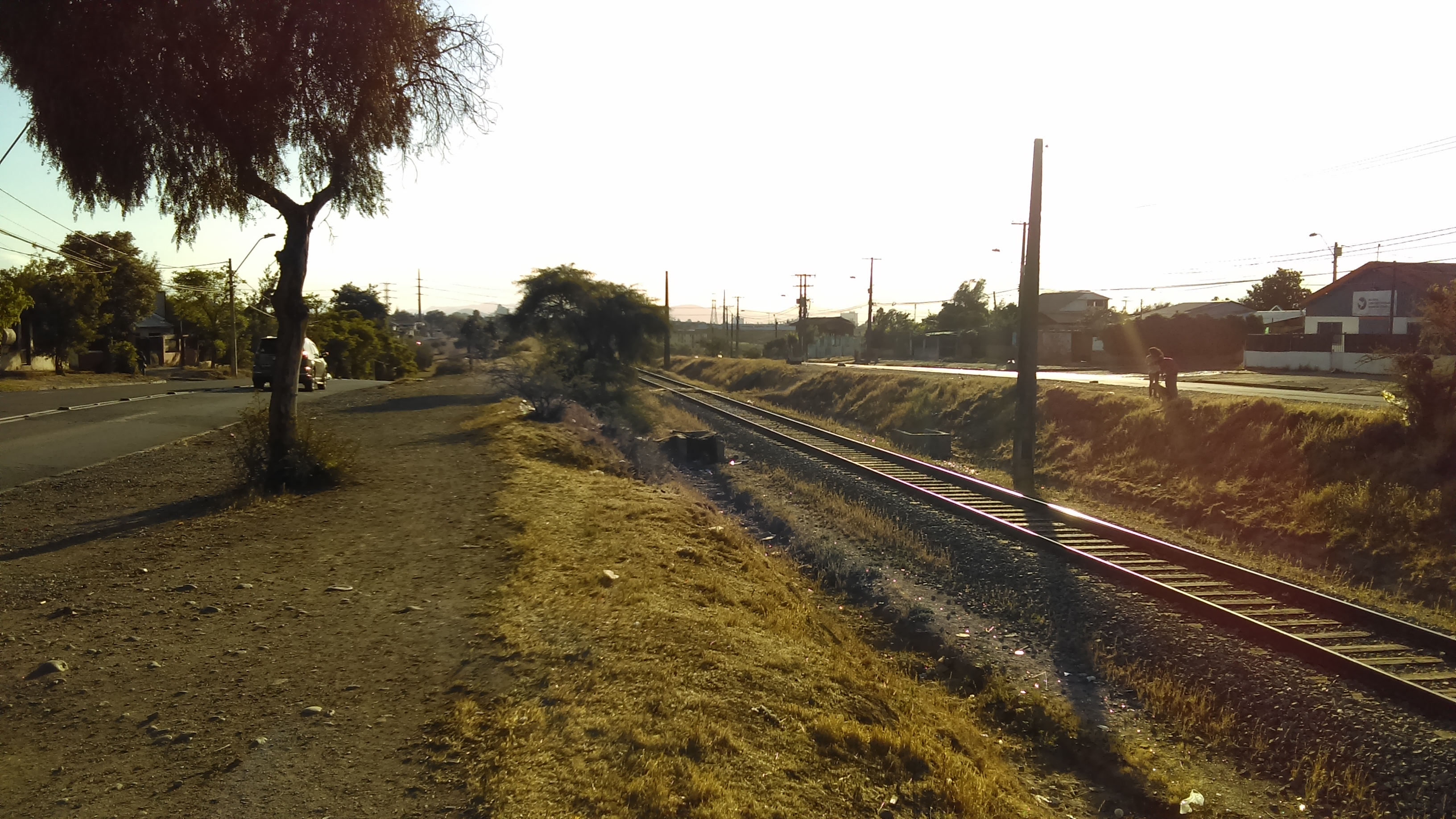 Imagen del Ramal Santiago - Cartagena, en su paso por la comuna de Cerrillos; la imagen fue tomada desde el puente Ferrocarril, de la avenida Lo Errázuriz. A esta altura se debería construir la nueva estación del melitrén "Lo Errázuriz"